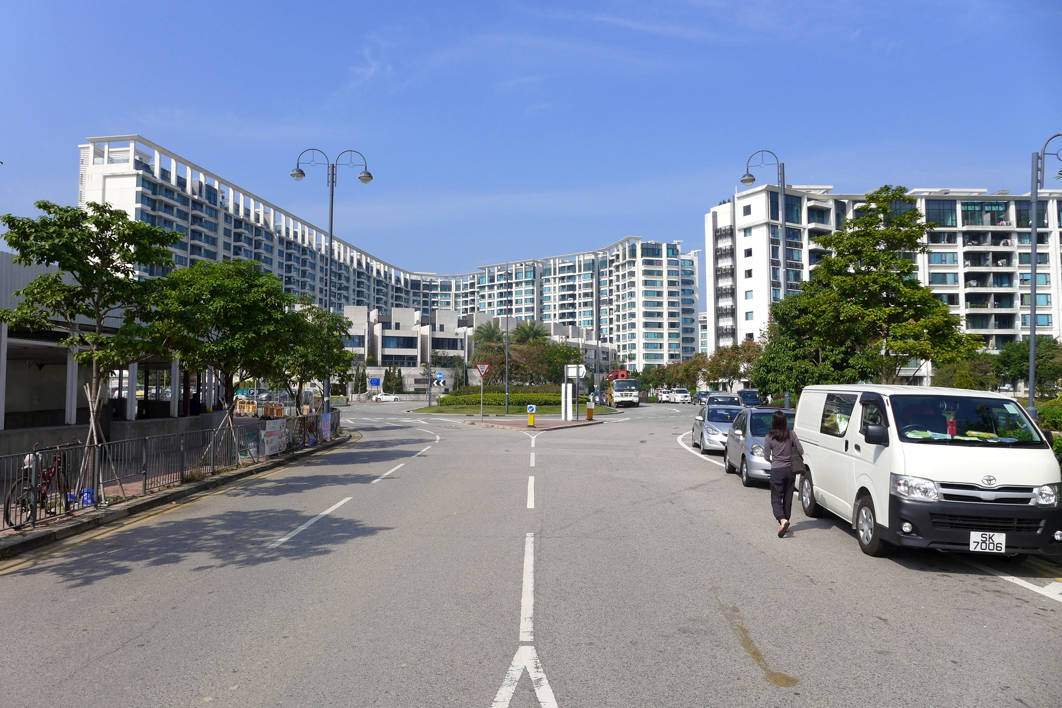 Providence Bay